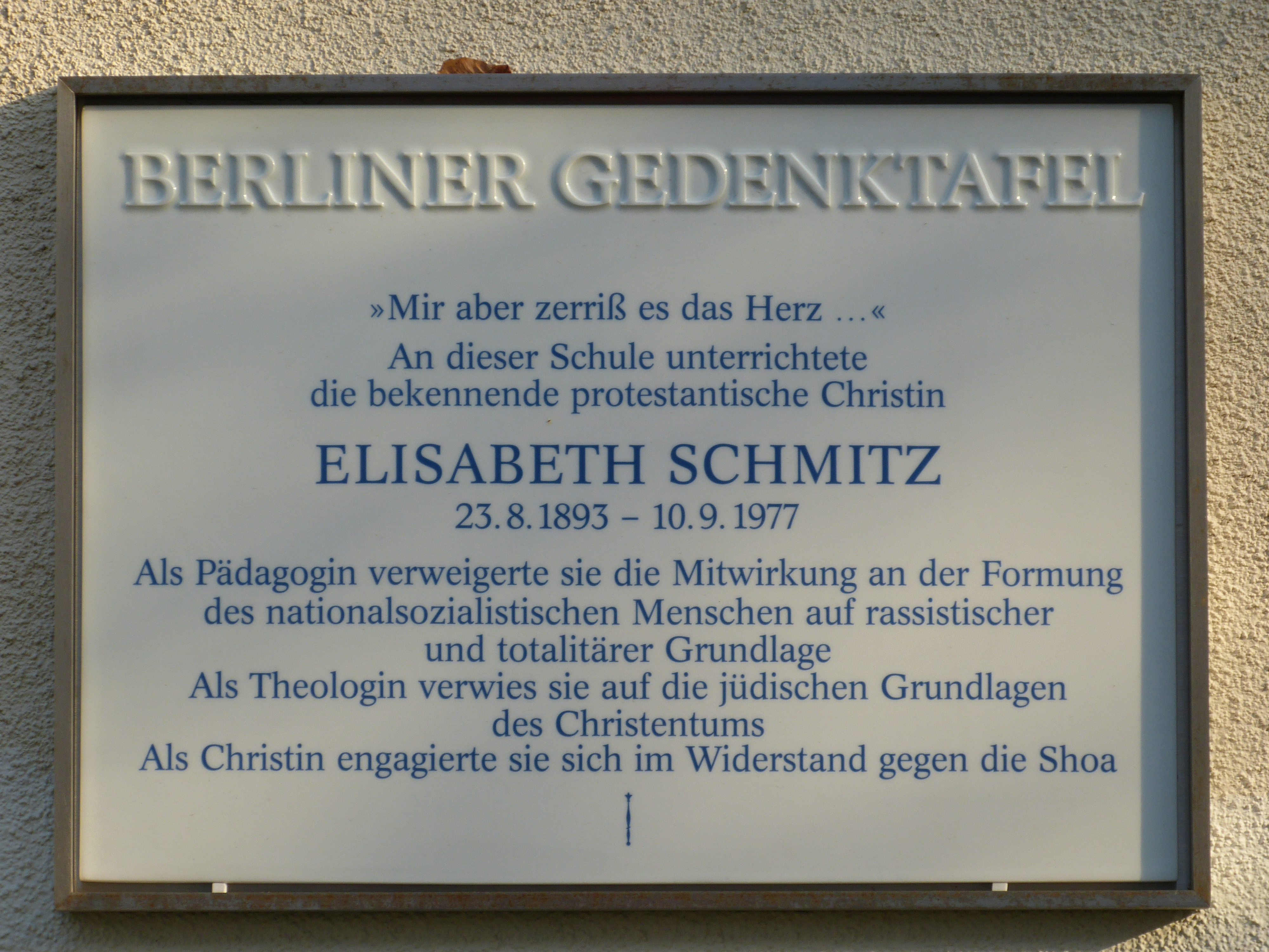 Berliner Gedenktafel für Elisabeth Schmitz an der Beethoven-Oberschule, Barbarastr. 9 in Berlin-Lankwitz